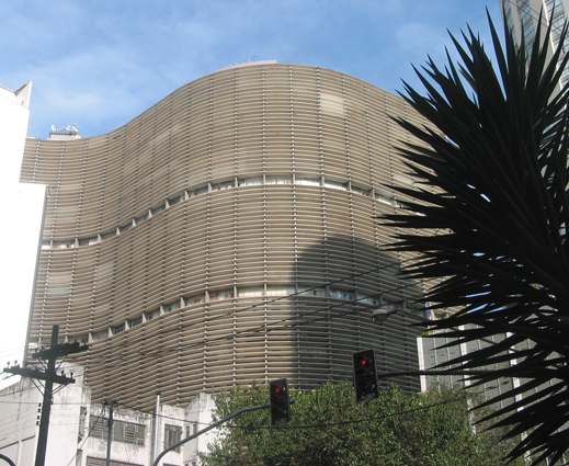 Jürgen Partenheimer, Oscar Niemeyer's Copan Building, construction end 1953